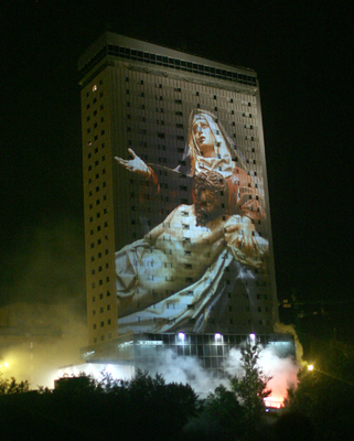 Edificio Duque de Lerma de Valladolid durante las Fiestas de Nuestra Sra. de San Lorenzo